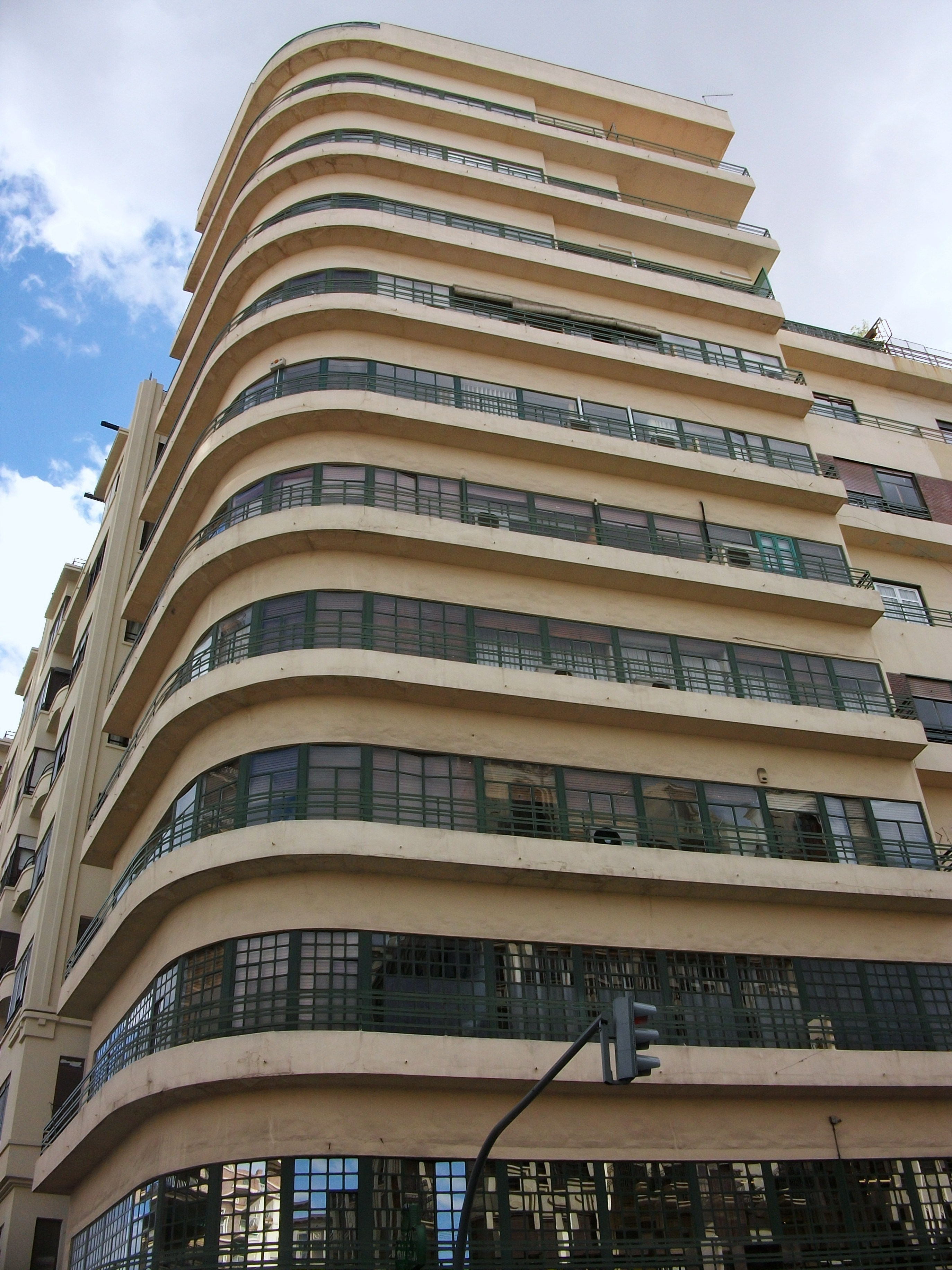 Edifici Alonso de València.